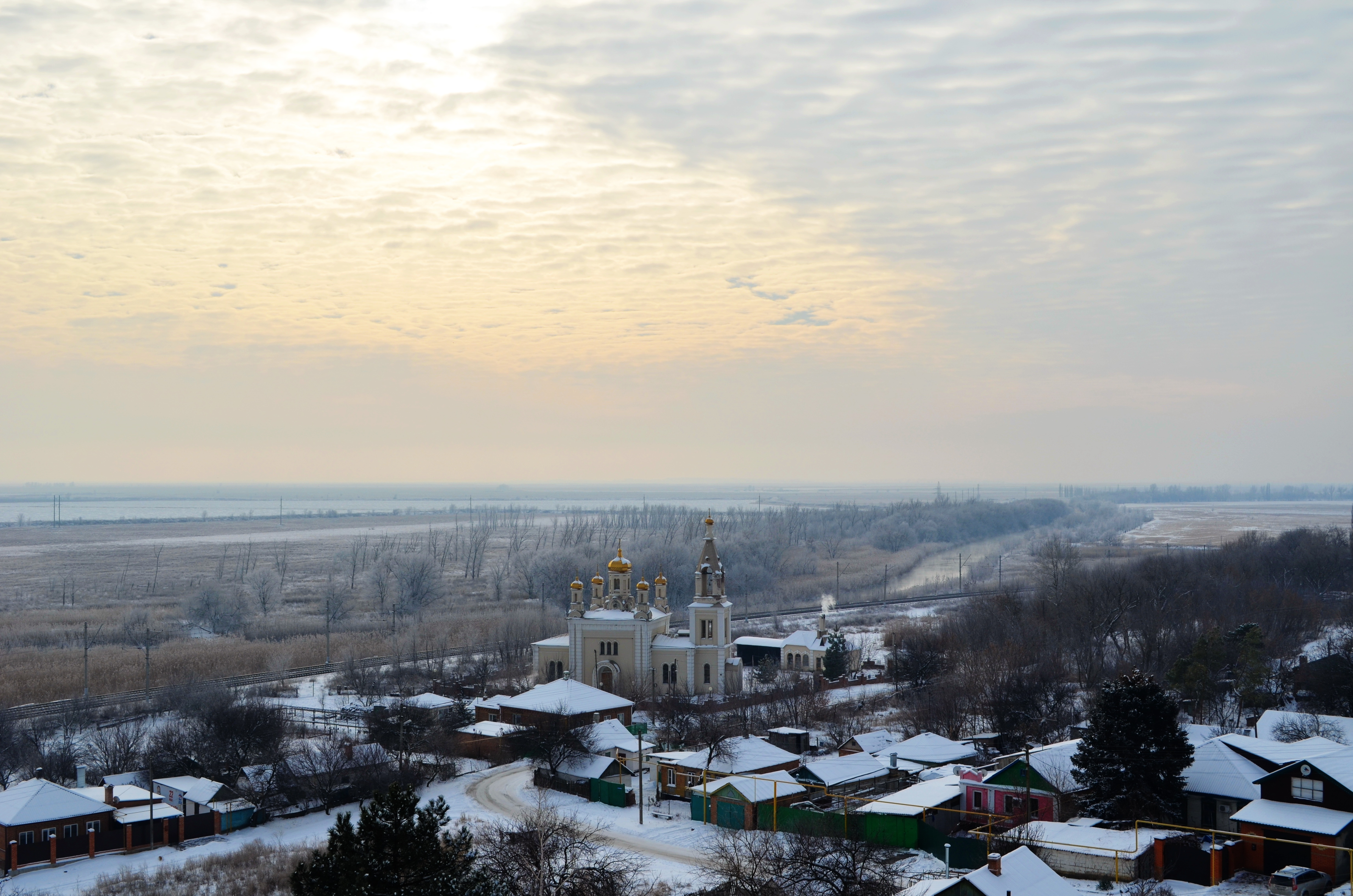 Домовая церковь Рождества Пресвятой Богородицы (1865), усыпальница рода Платовых (с 1867) и графа М.И. Платова (в период 1875-1911): х. Малый Мишкин, Аксайский район, Ростовская область